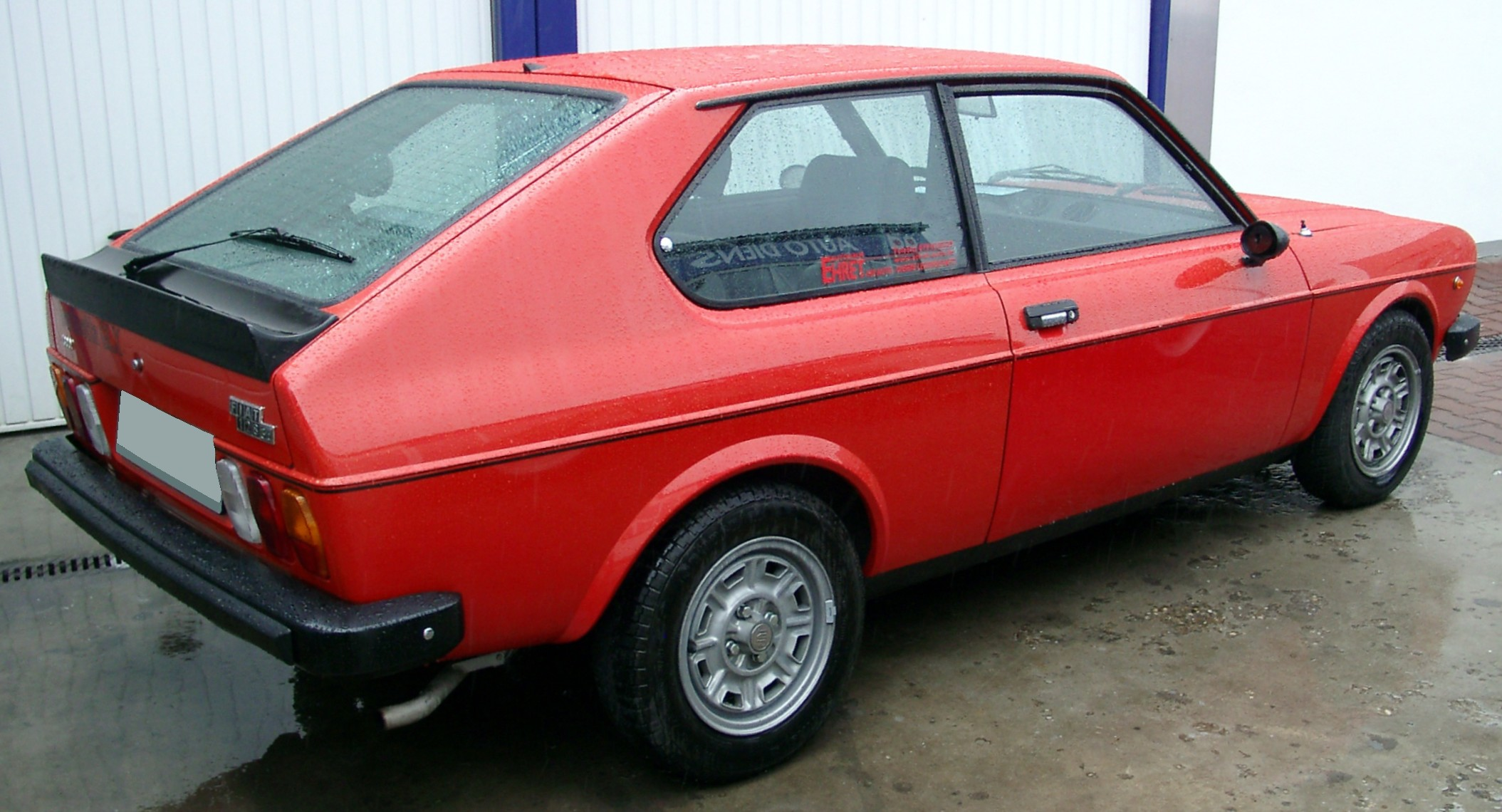 Fiat 128 Berlinetta